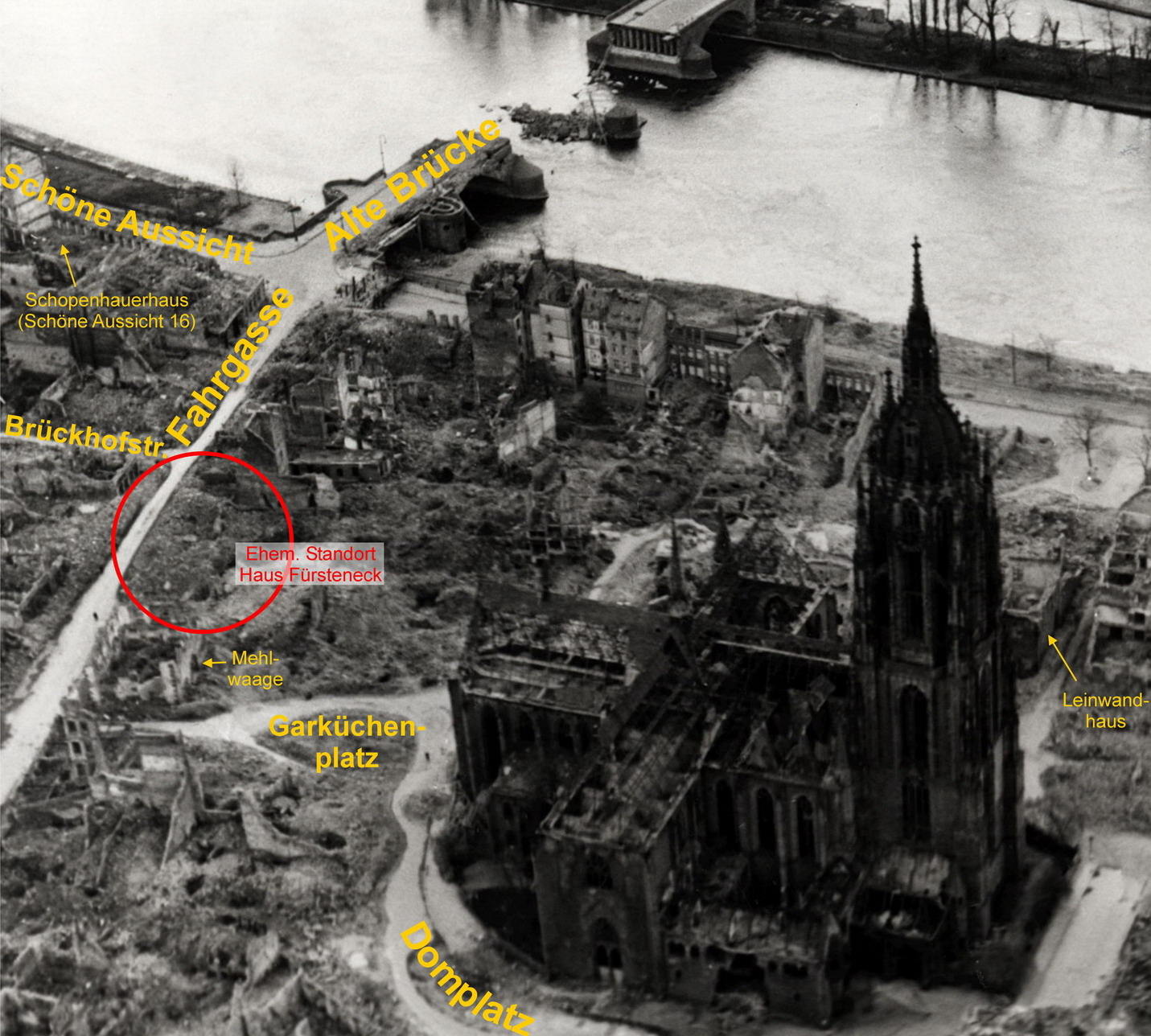 Lage des Haus Fürsteneck in der zerstörten Altstadt von Frankfurt am Main, 1945. Ausschnitt aus Image:Frankfurt Am Main-Altstadt-Zerstoerung-Luftbild 1944.jpg, bearbeitet.